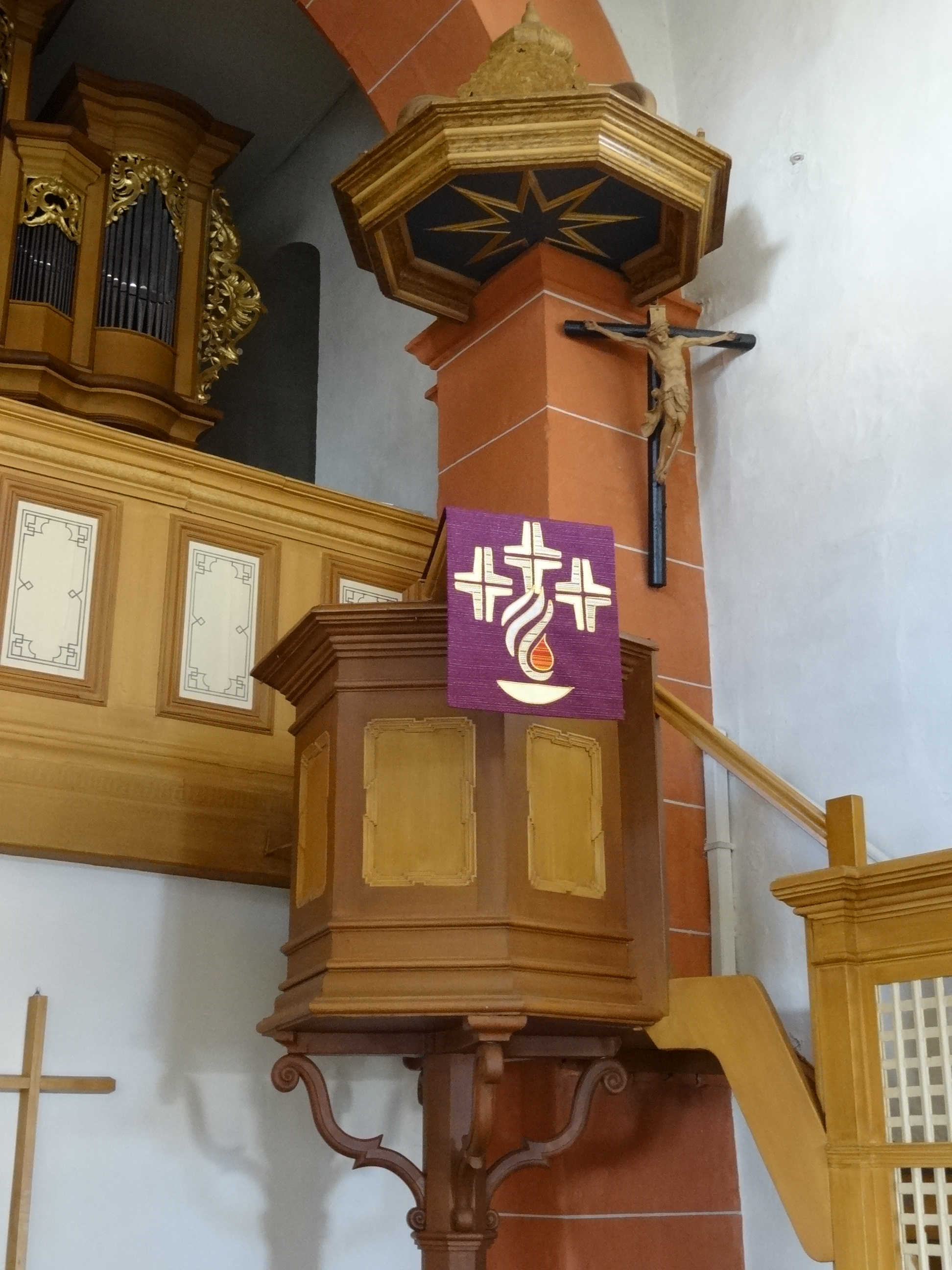 Evangelische Kirche Trais-Horloff